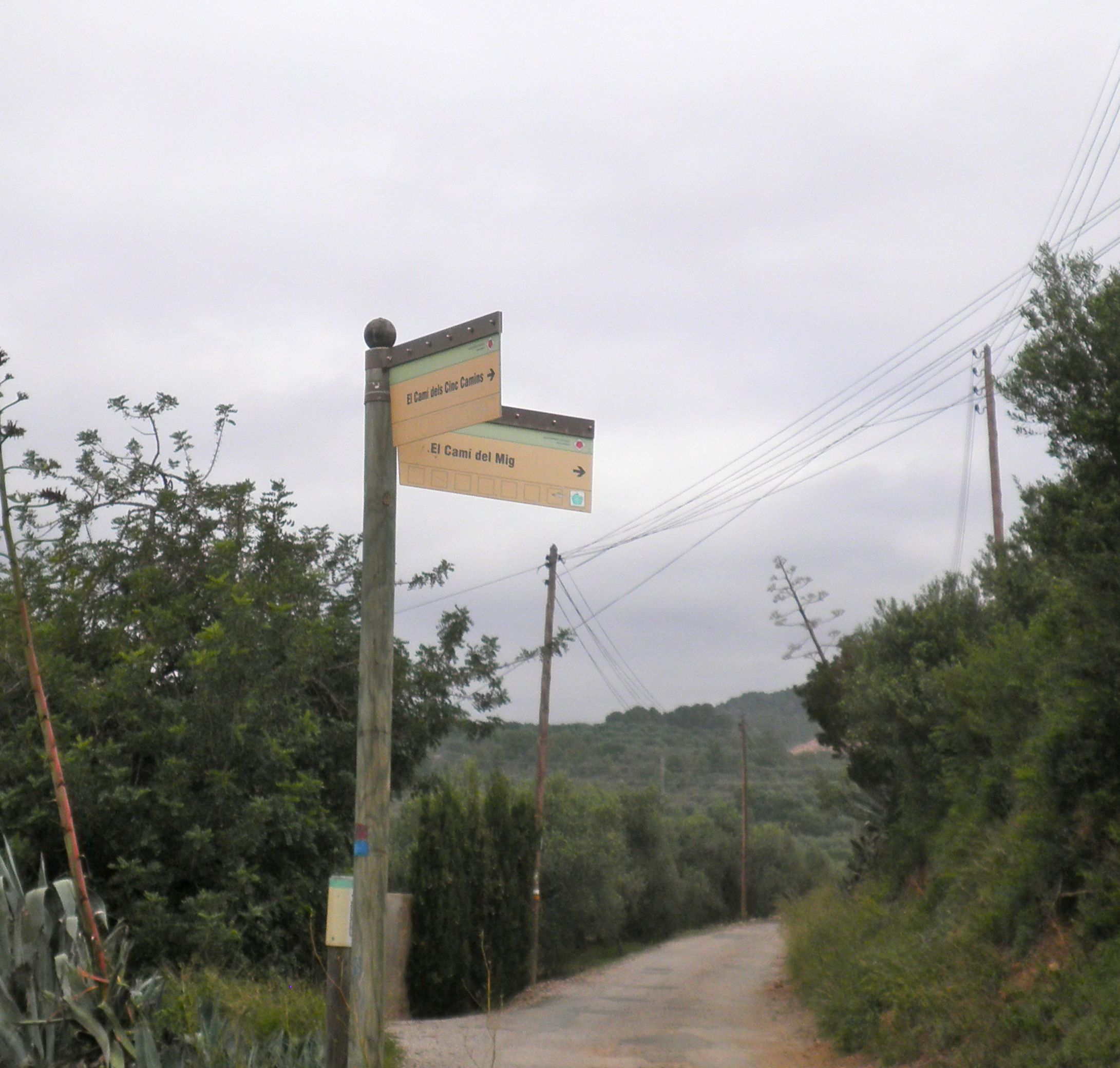 El camí del Mig, als Cinc Camins